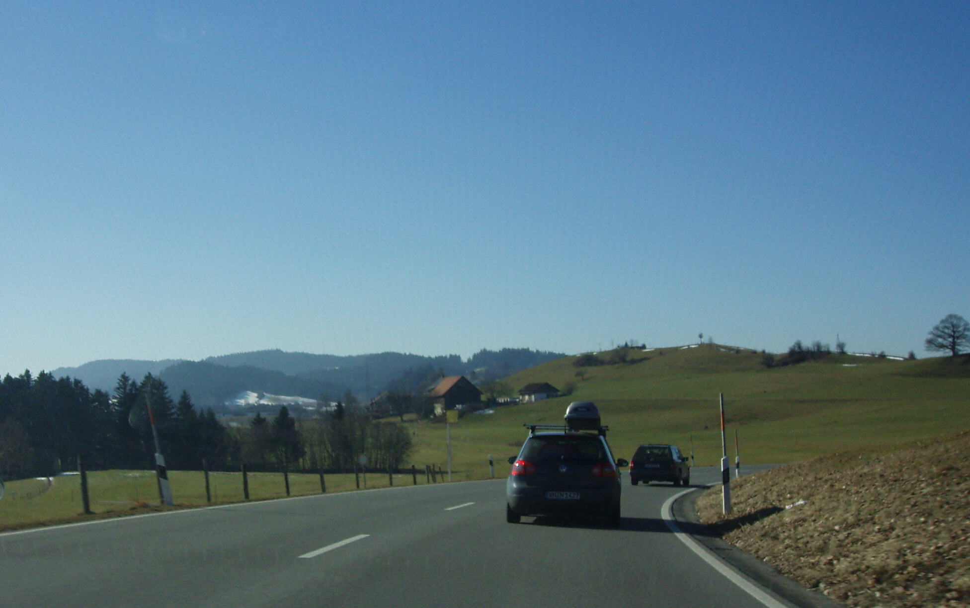 Queralpenstraße